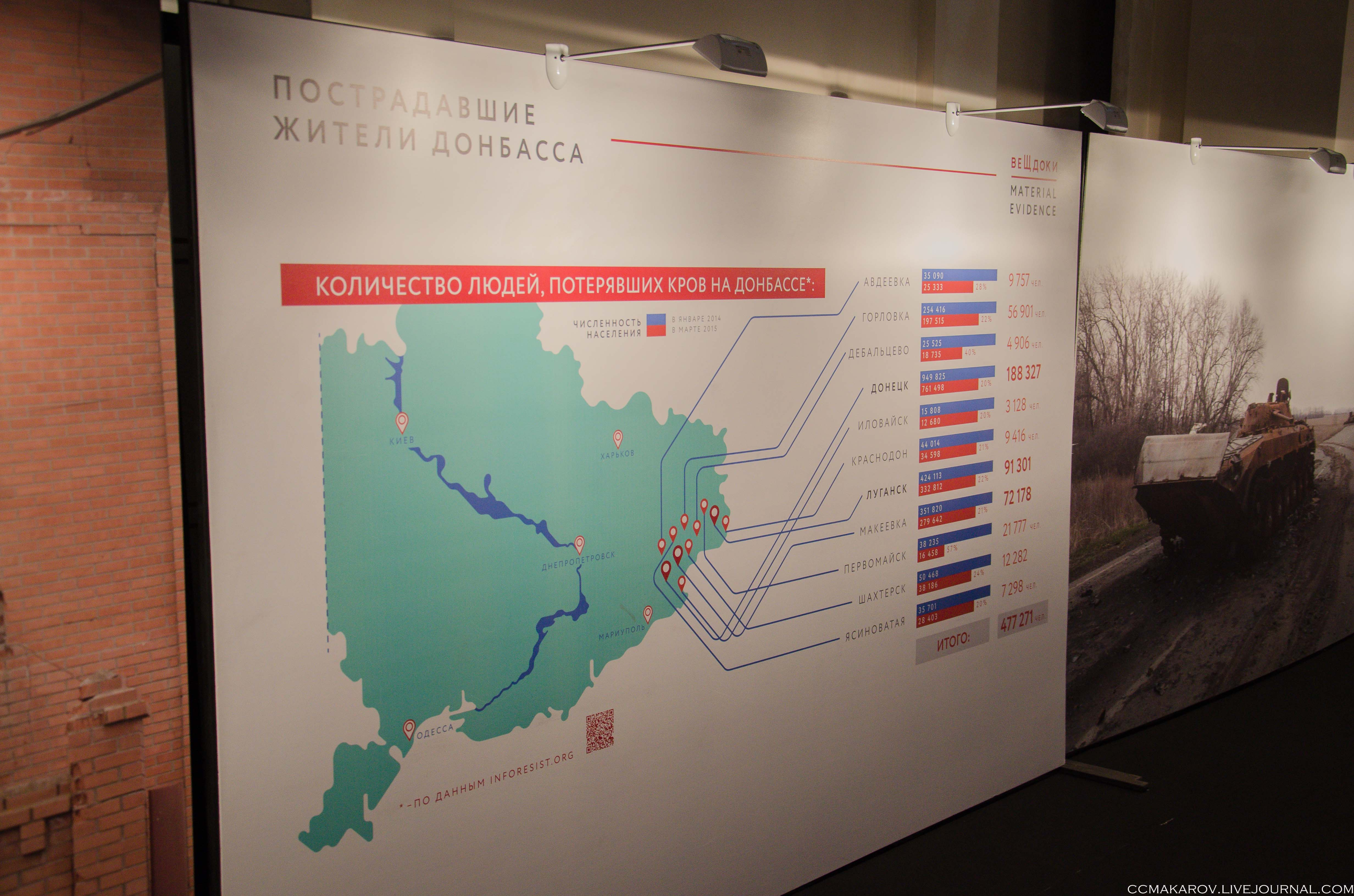 Выставка «Вещественные доказательства. Донбасс. 365 дней» в Москве на ВДНХ в павильоне «Украина» посвящена войне на востоке Украины. Хотя на стенде написано «Количество людей, потерявших кров на Донбассе» (то есть утративших жилище или крышу над головой), на самом деле в первоисточнике, на который указывает QR-код, речь идёт о переселенцах (то есть о людях которые переехали в другие регионы Украины по различным причинам, а не только по причине утраты жилища).